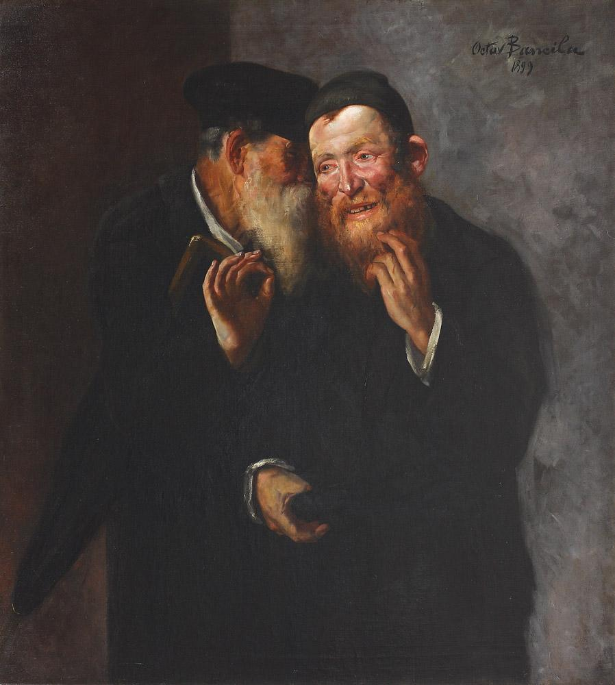 Good Deal by Octav Băncilă. Opera a participat la Prima Expoziție Personală din 1900, la Sala de decoruri a Teatrului Național din Iași și este menționată ca atare în monografia "Octav Băncilă", Anton Coman, E.S.P.L.A., 1956, pag 27. Opera este menționată în revista "Lumea", nr. 1, 1 octombrie 1899, pag. 10, în articolul dedicat lui Octav Băncilă, semnat de A. Rodion. Opera este reprodusă în monografia "Octav Băncilă", C. Săteanu, Revista Arta și Arheologia, 1930, la pag. 4.